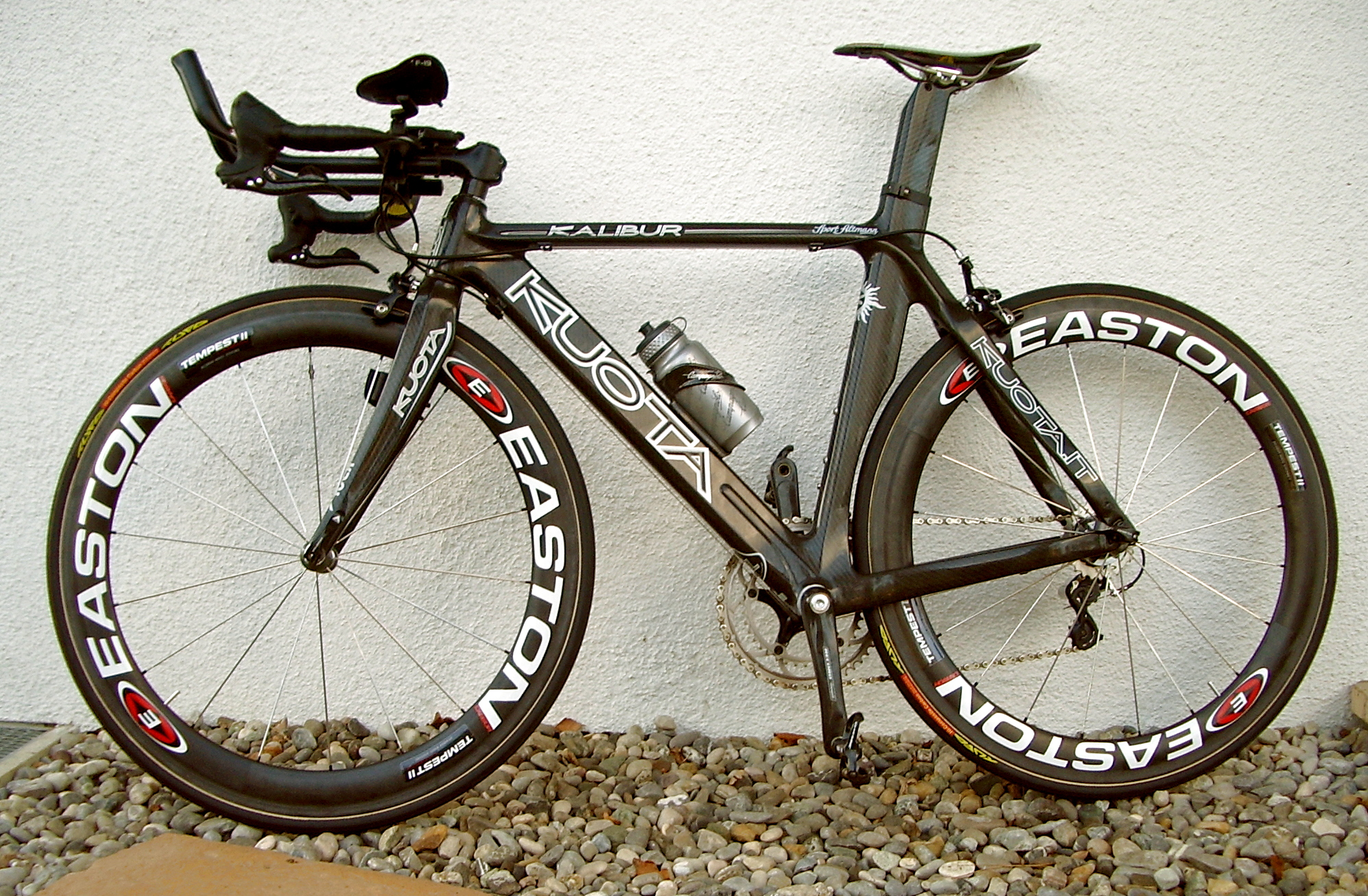 Zeitfahrmaschine mit typischer, besonders aerodynamischer, Geometrie. Material komplett Carbon zur Gewichtsoptimierung.